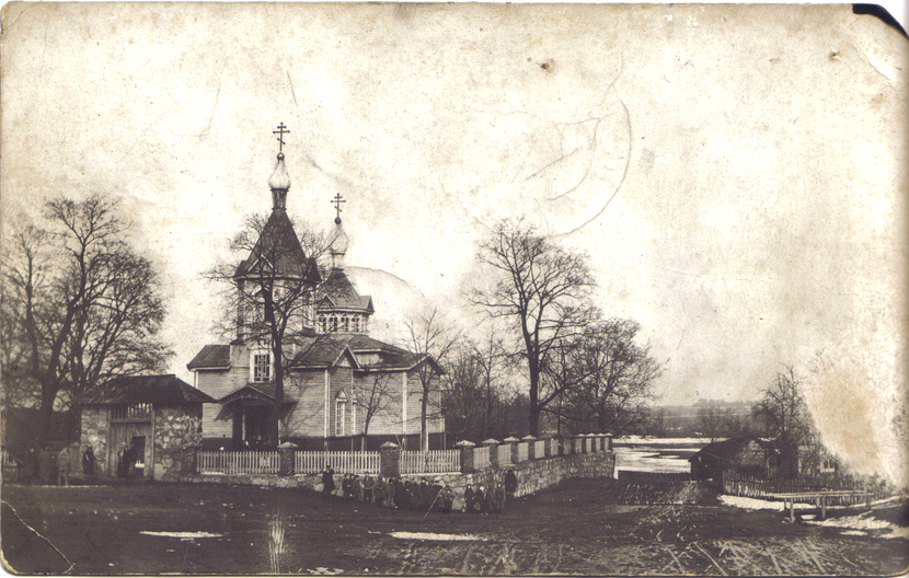 Беларуская (тарашкевіца): Вязынь (Viazyń). Царква Покрыва Багародзіцы